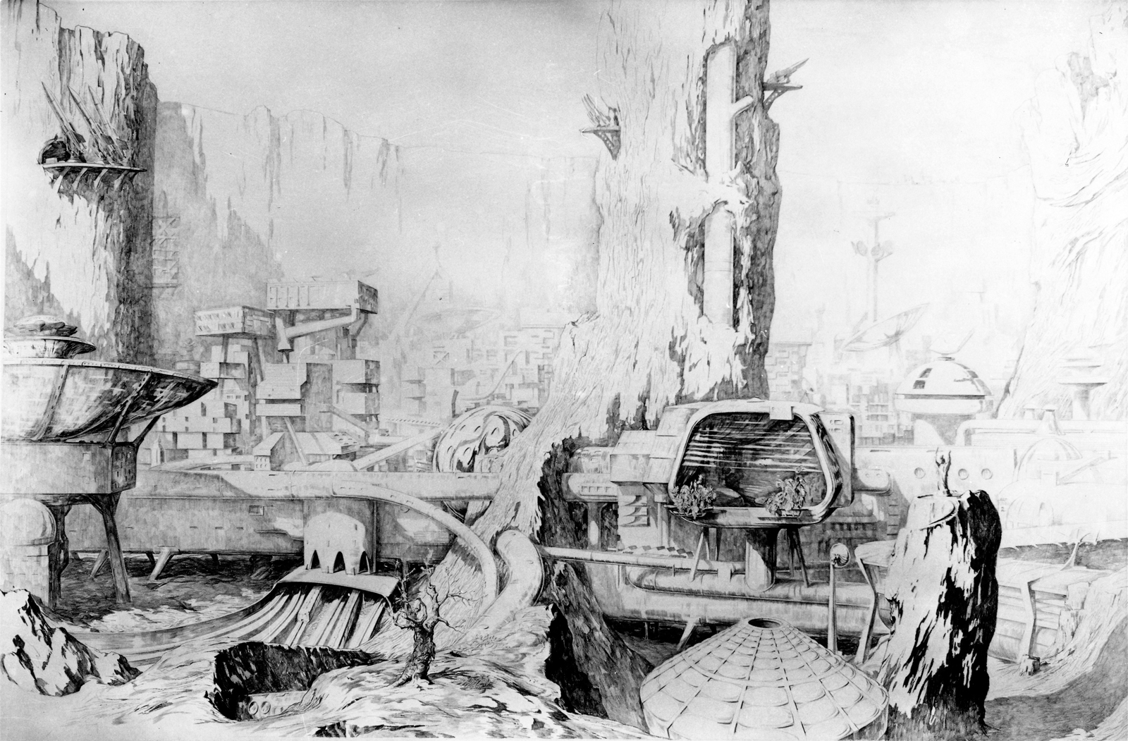 Milan Ressel, Splendid Isolation, černobílá fotografie barevné kresby 150x210 cm (1978)